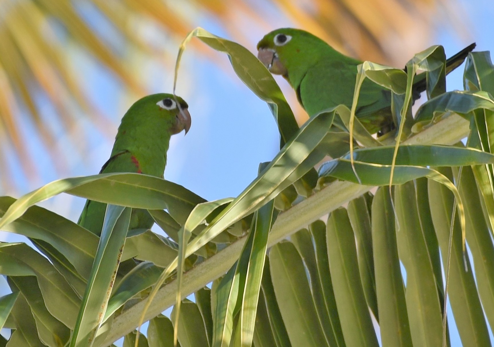 Haitisittich Psittacara chloropterus Aufnahme in La Romana